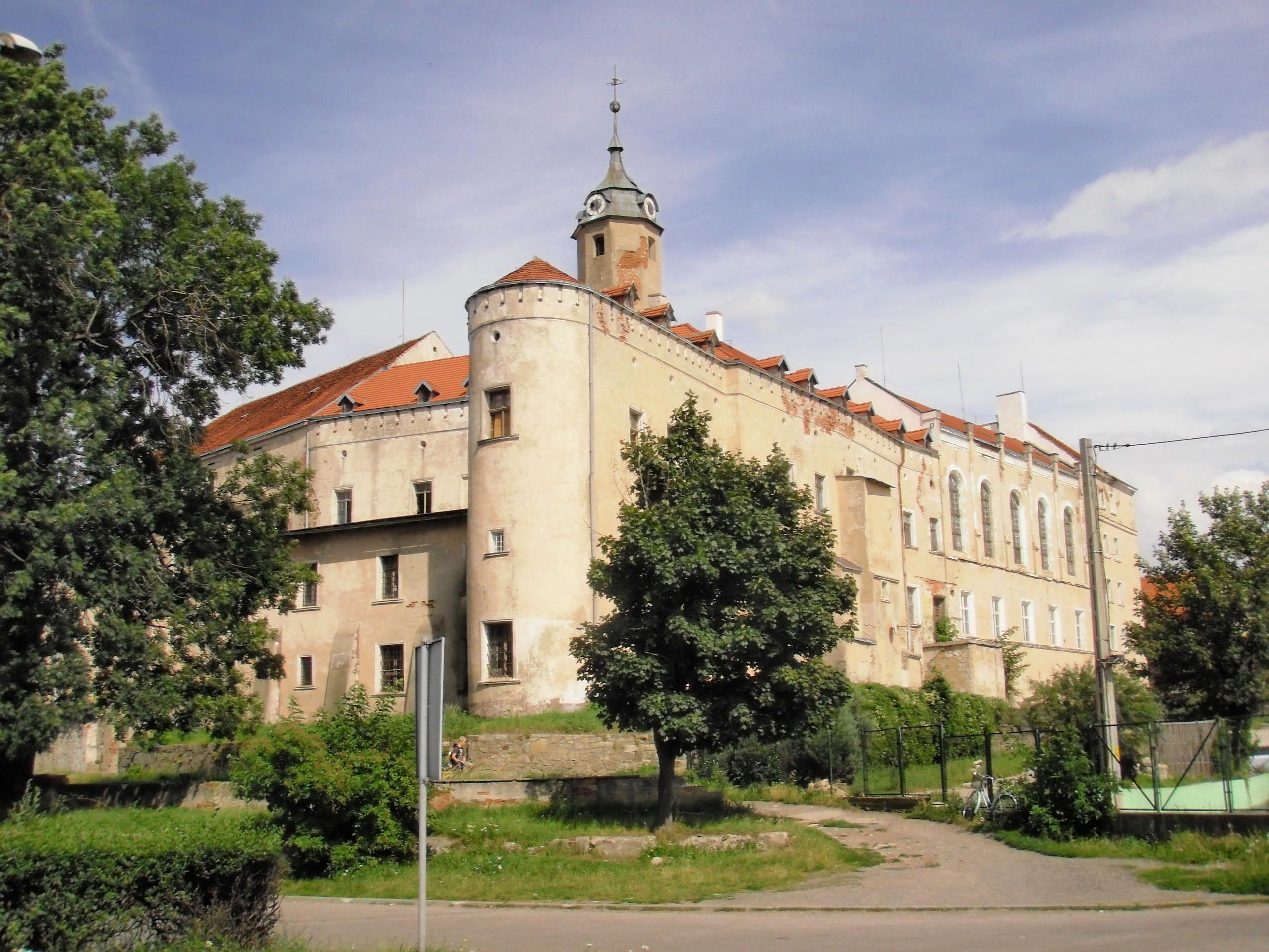 Jawor, zamek, XIII, XIX